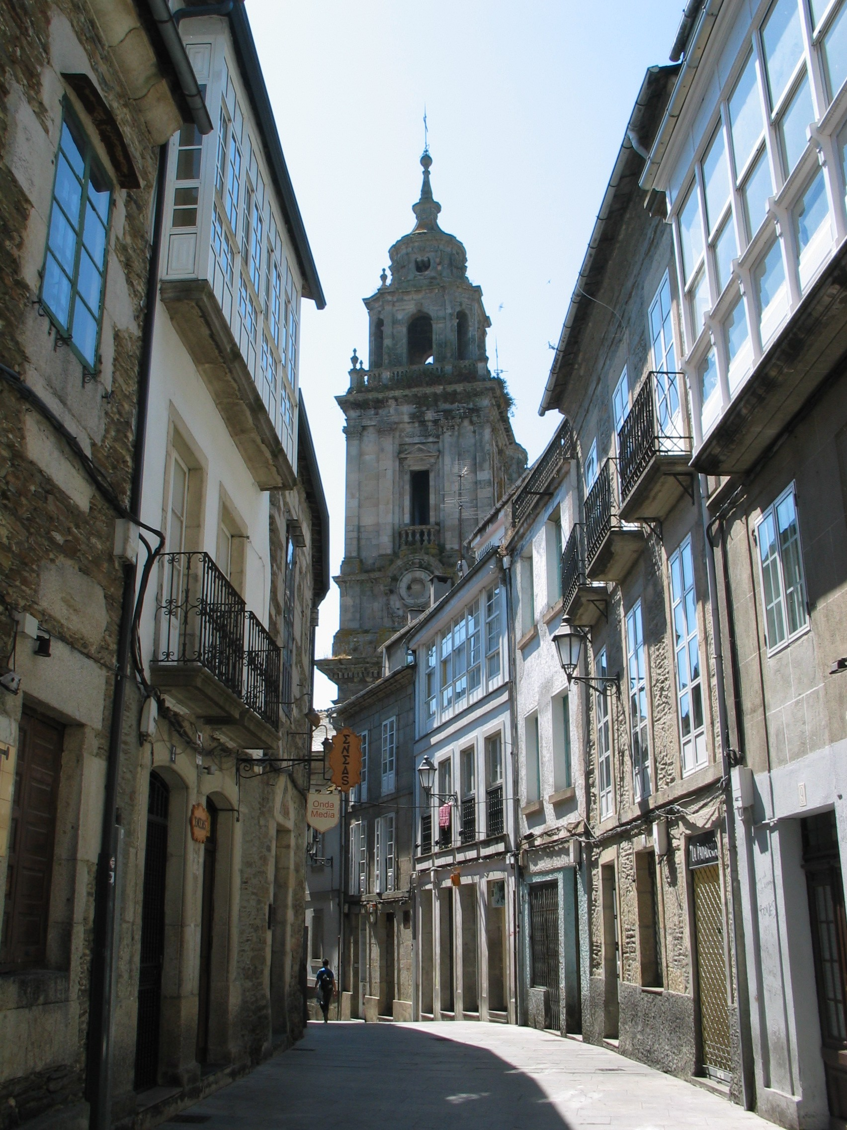 Billedet viser katedralen i Lugo og de omkringliggende bygninger i meget typisk stil for området